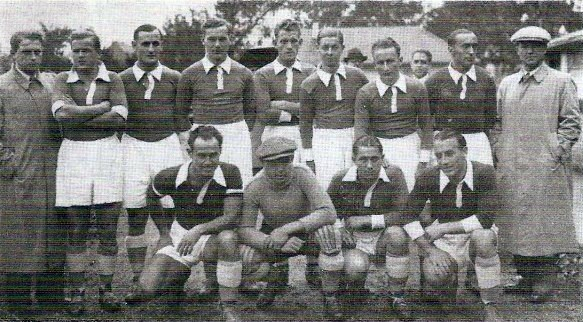 Racing Club de Strasbourg en 1936-1937. Debout de gauche à droite : Zinsmeister (manager), Rohr, F. Keller, Bauer, Humenberger, Halter, Waechter, H. Hoffmann, Blum (entraîneur). Accroupis de gauche à droite : Schwartz, Mayer, Lohr, Heisserer.